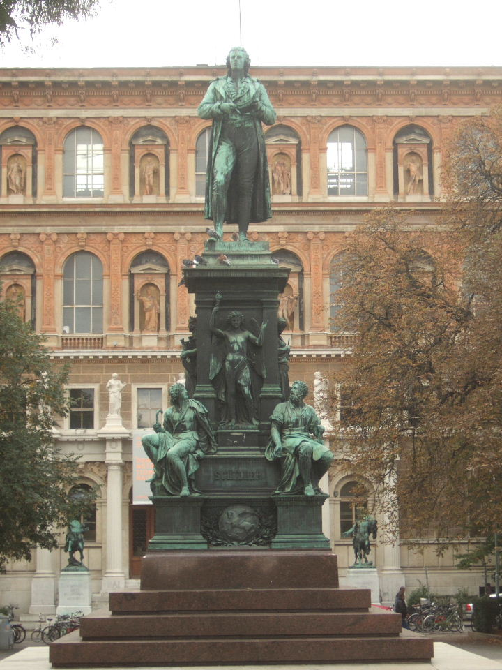 Wien: Denkmal für Friedrich Schiller auf dem Schillerplatz - Entwurf von Johannes Schilling/ Ausführung Franz Pönninger (1876) - im Hintergrund die Akademie der bildenden Künste Wien